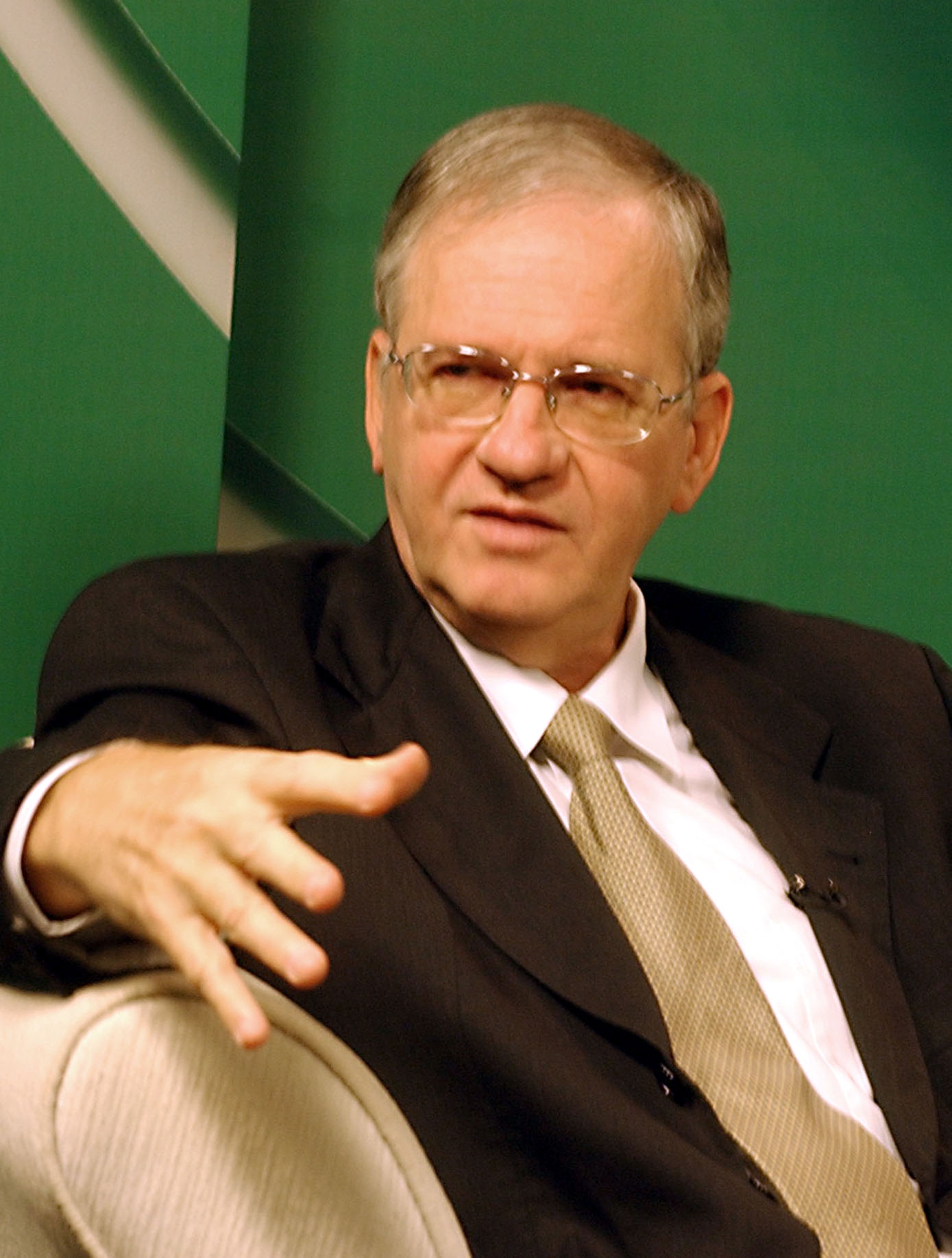 Brasília - O presidente do Conselho Nacional de Desenvolvimento Científico e Tecnológico (CNPq), Marco Antonio Zago, durante entrevista à TV NBr.